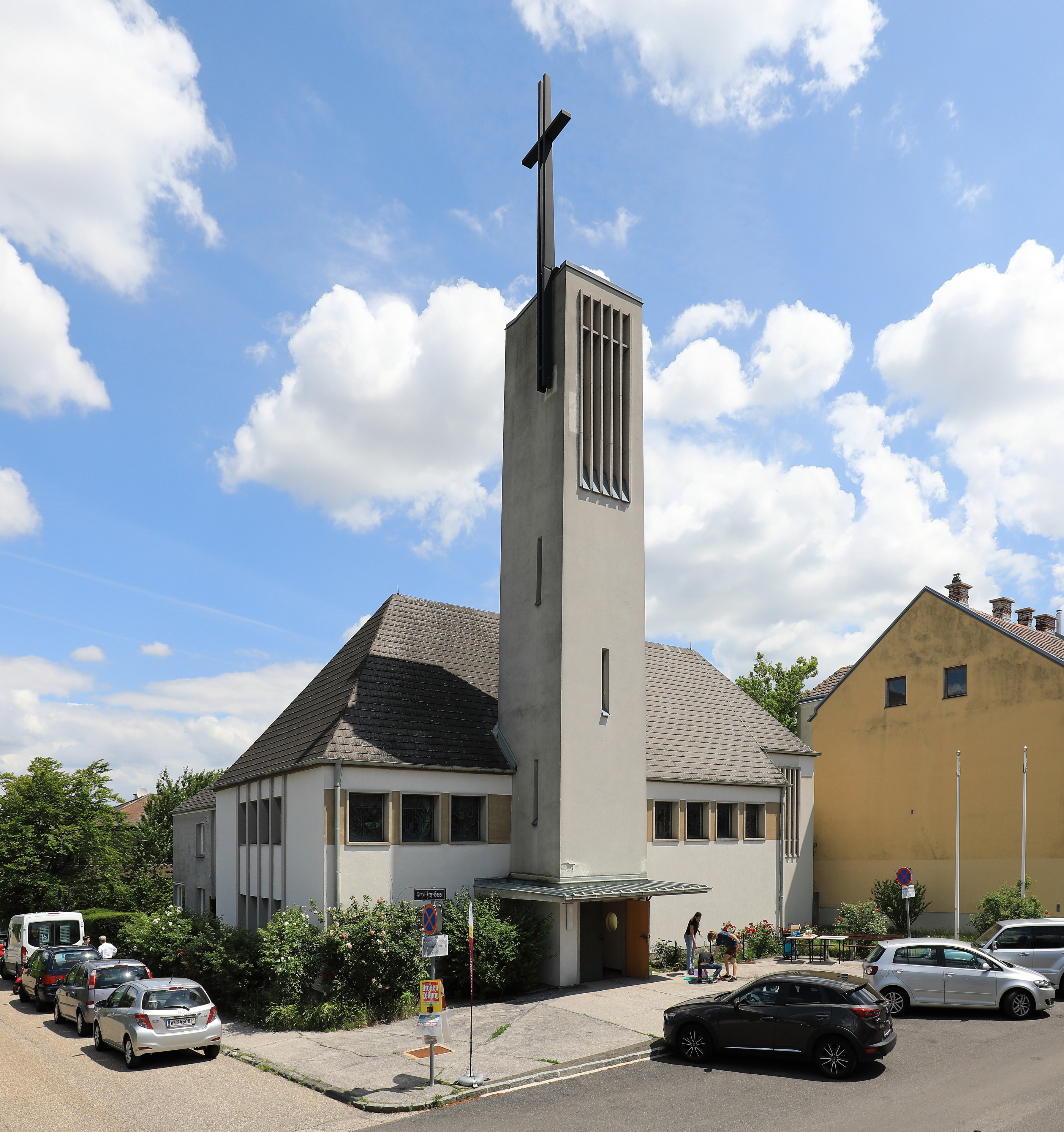 Westansicht der evangelischen Christ-Königs-Kirche in der niederösterreichischen Marktgemeinde Perchtoldsdorf. Die Kirche mit eingezogenem Rechteckchor und eingestelltem, quadratischem Turm im Eingangsbereich wurde nach Plänen des Architekten Sepp (Josef) Schuster errichtet. Die Grundsteinlegung fand am 2. August 1959 statt und die Einweihung am 17. Juni 1962.